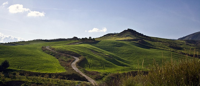 Bivona